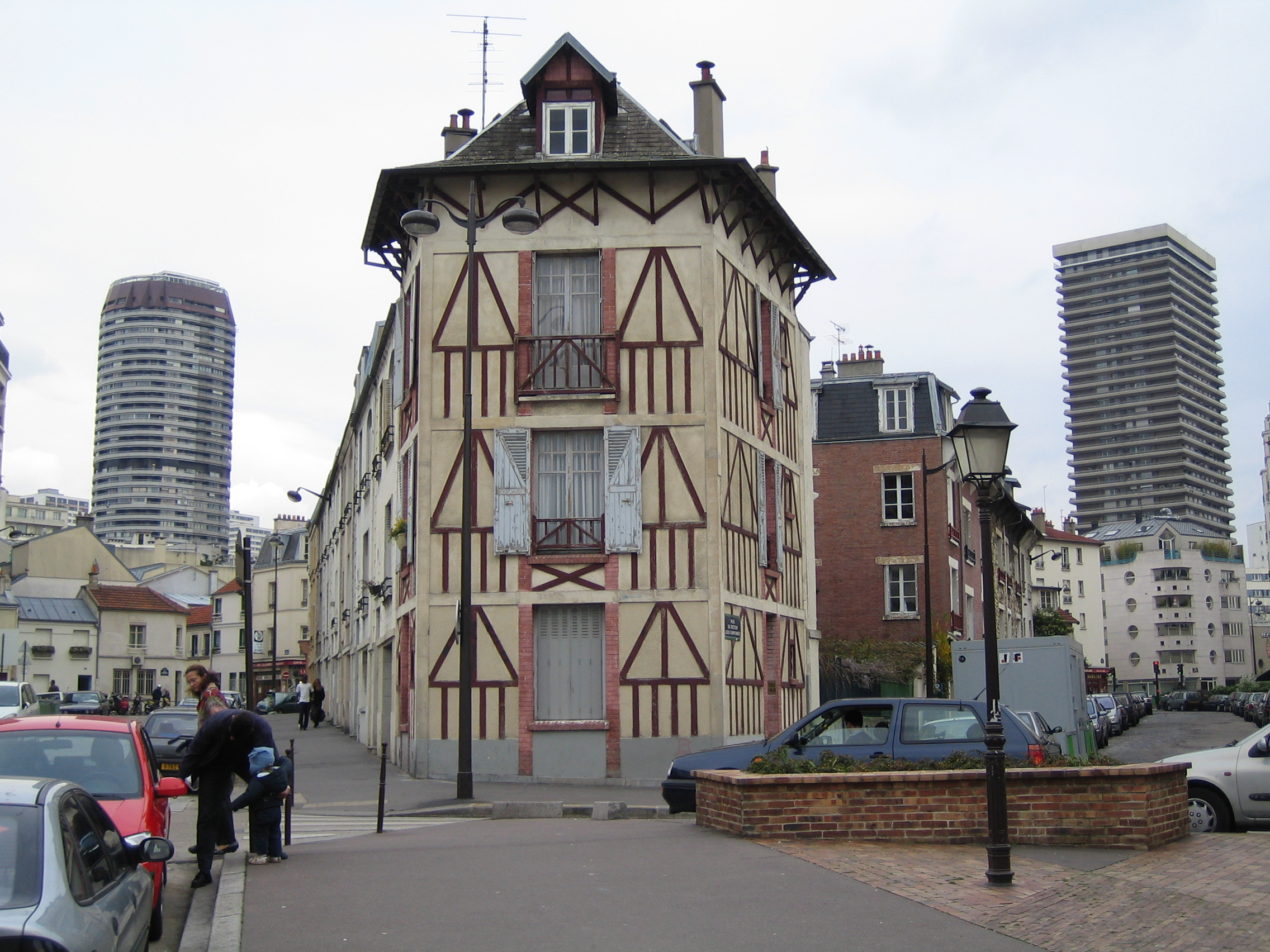 Paris, XIIIe arrondissement. Rue du Docteur-Leray on the left.